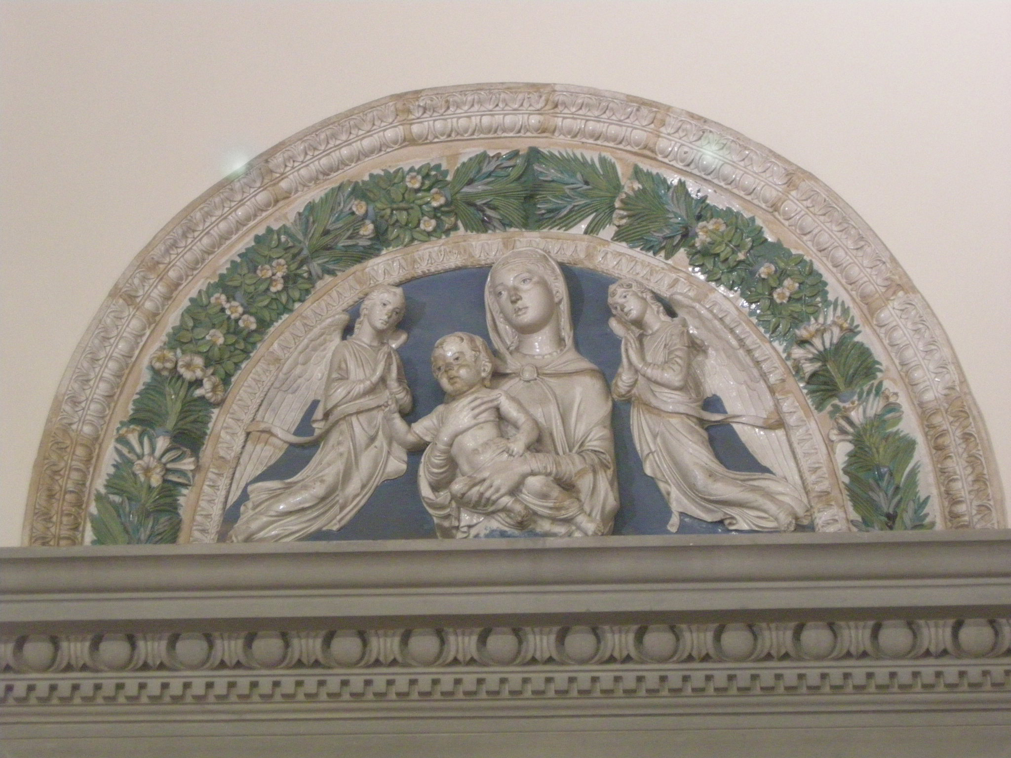 Palagio di parte guelfa, sala brunelleschi, porta con lunetta luca della robbia